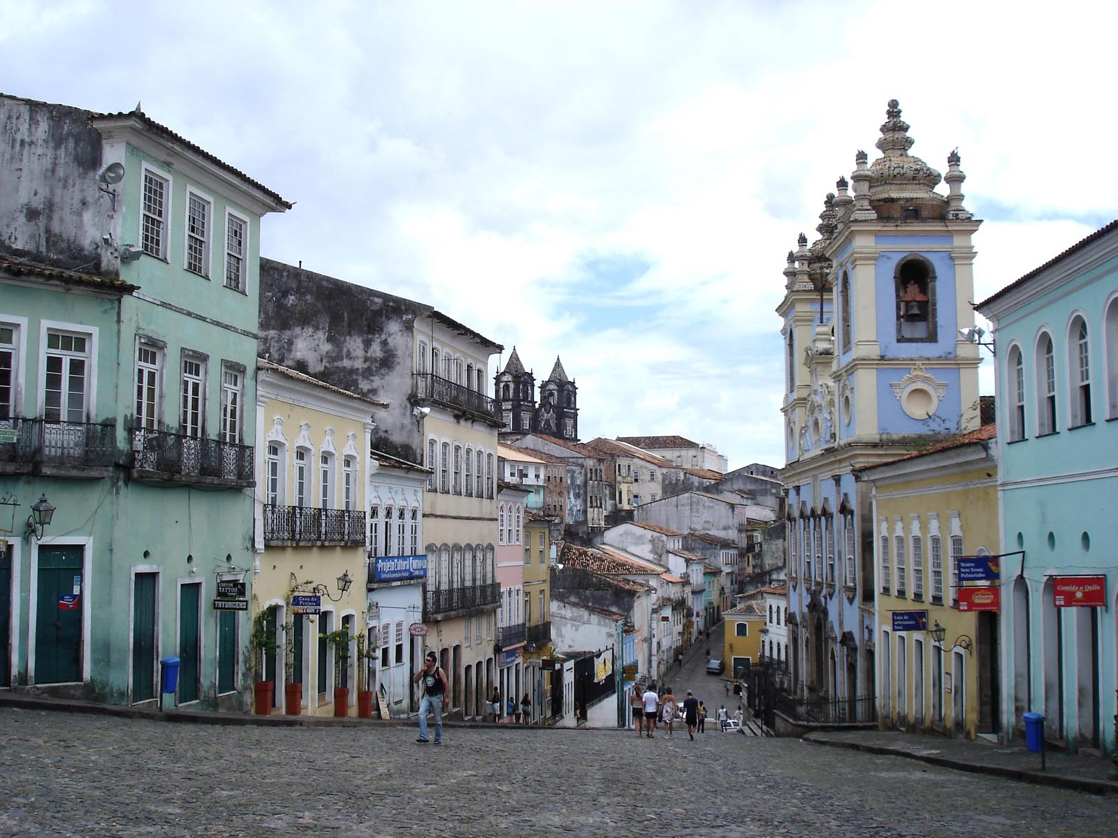 Salvador Historical Centre, Bahia, Brazil